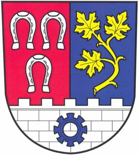 Oficiální znak města Hostivice